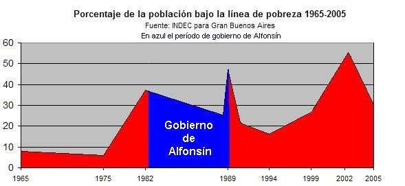 Pobreza. Porcentaje de la población del Gran Buenos Aires bajo la línea de pobreza 1965-2005. Argentina. En azul el período de gobierno de Alfonsín. Poverty rate 1965-2005. Graphic